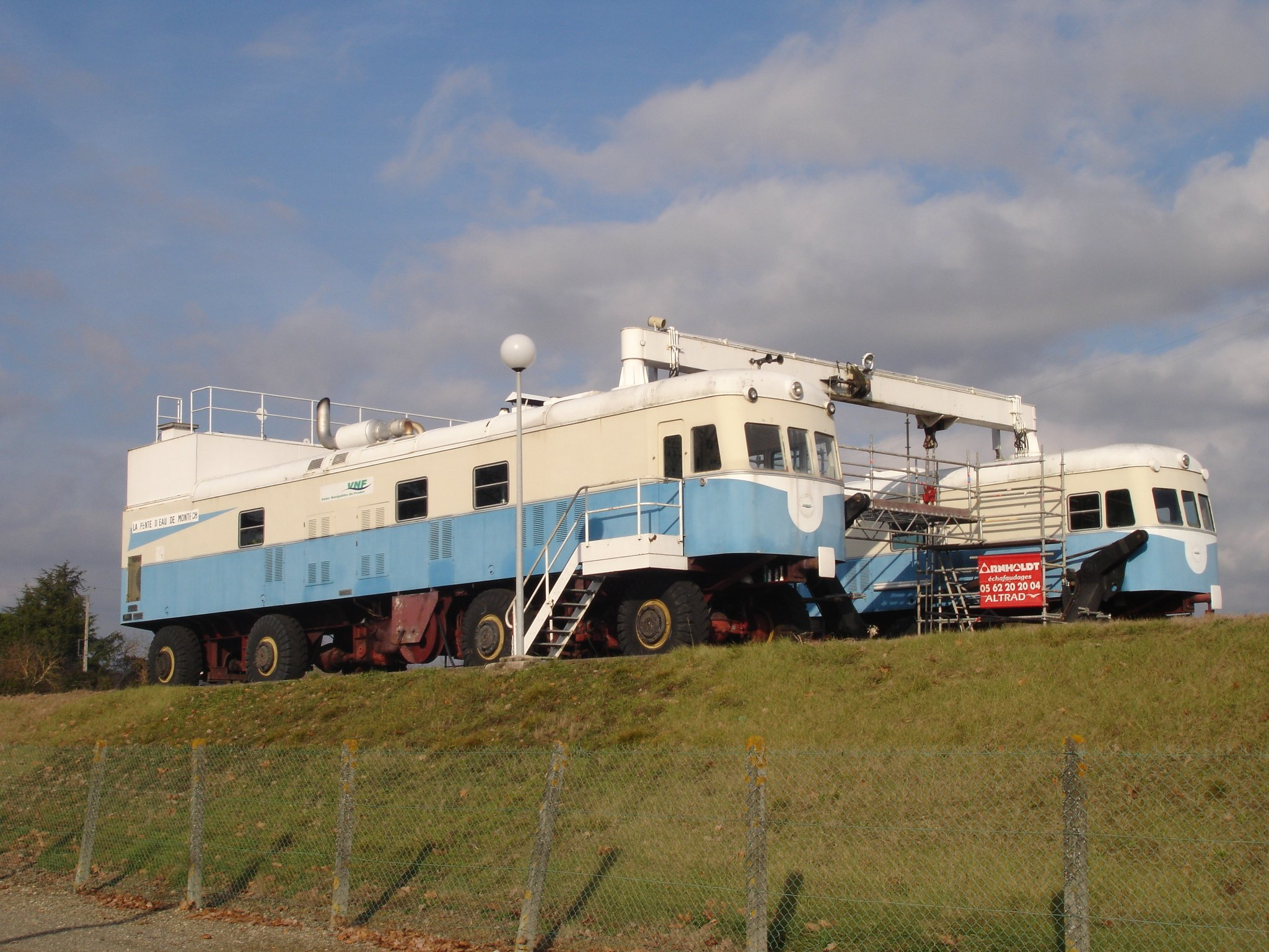 France - Montech(82) - Automotrices de la pente d'eau de Montech.